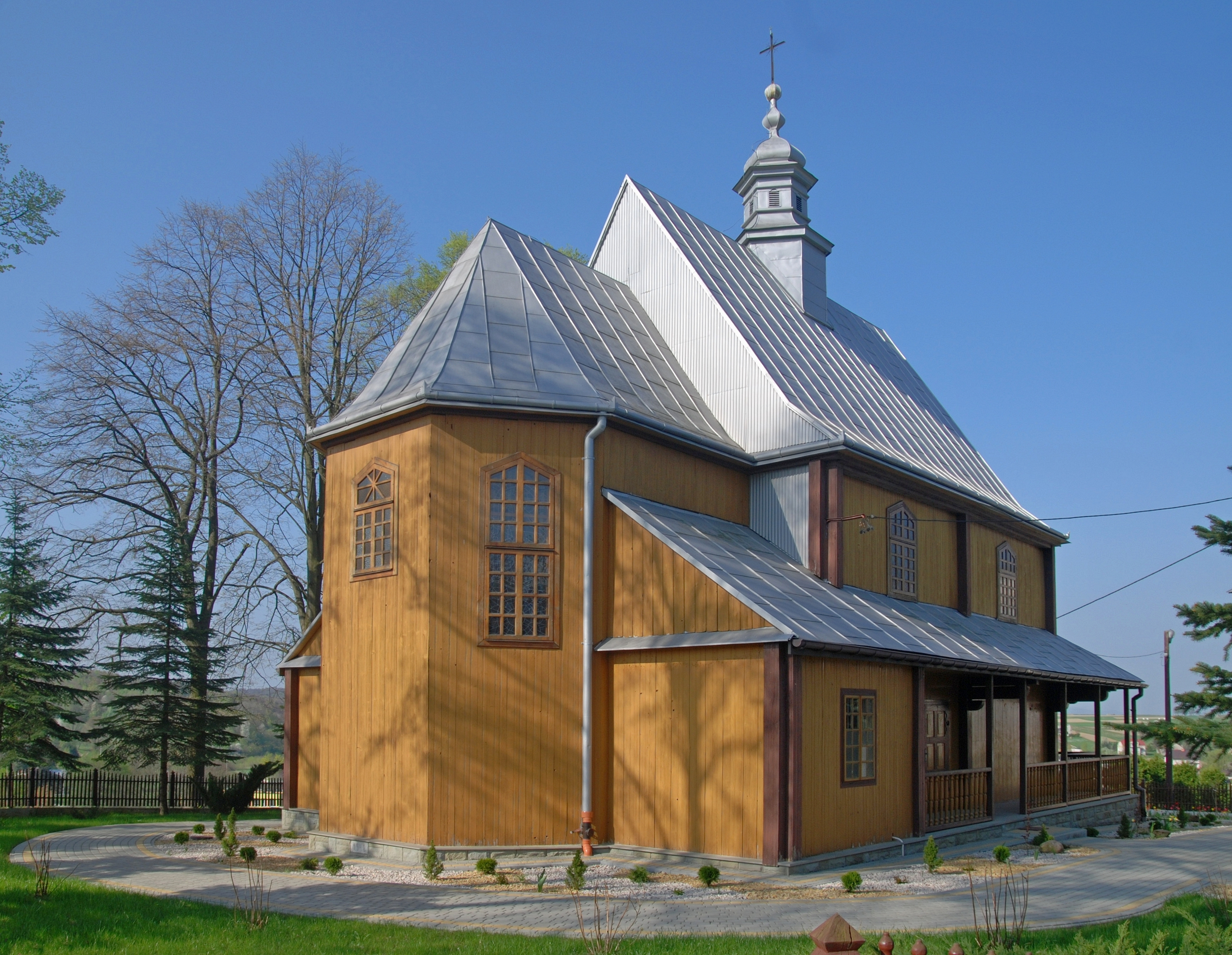 wieś Łubienko